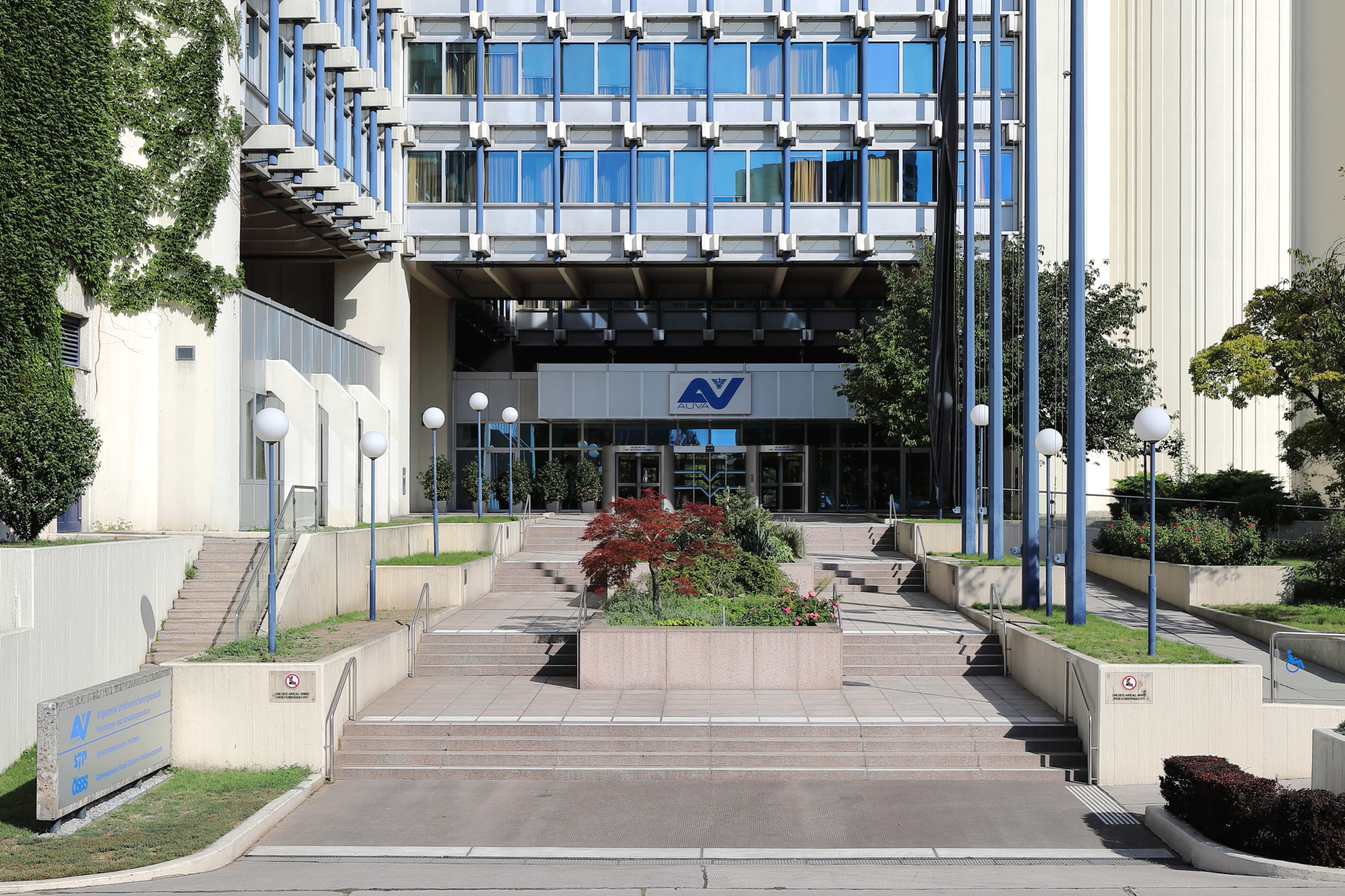 Portalbereich der Zentrale der Allgemeinen Unfallversicherungsanstalt (AUVA) an der Adresse Adalbert-Stifter-Straße 65 im 20. Wiener Bezirk Brigittenau.Der Baukomplex wurde ab 1972 nach Plänen des Architekten Kurt Hlaweniczka (Statik Kurt Koss) errichtet und am 6. Mai 1977 eröffnet. Das Gebäude ist eine Art Hängekonstruktion mit 4 Stahlbetontürme von rd. 64 m Höhe und 6 Stahlbetontürme mit rd. 31 m Höhe (2 westseitig und 4 ostseitig). Diese sind in der Art eines Brückenbauwerks miteinander verbunden und an diesen Verbindungselementen sind mittels Stahlhängesäulen drei- beziehungsweise zwölfgeschossige Bürokomplexe aufgehängt.